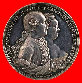 Medaille Karel Christiaan van Nassau-Weilburg en Carolina van Oranje-Nassau.